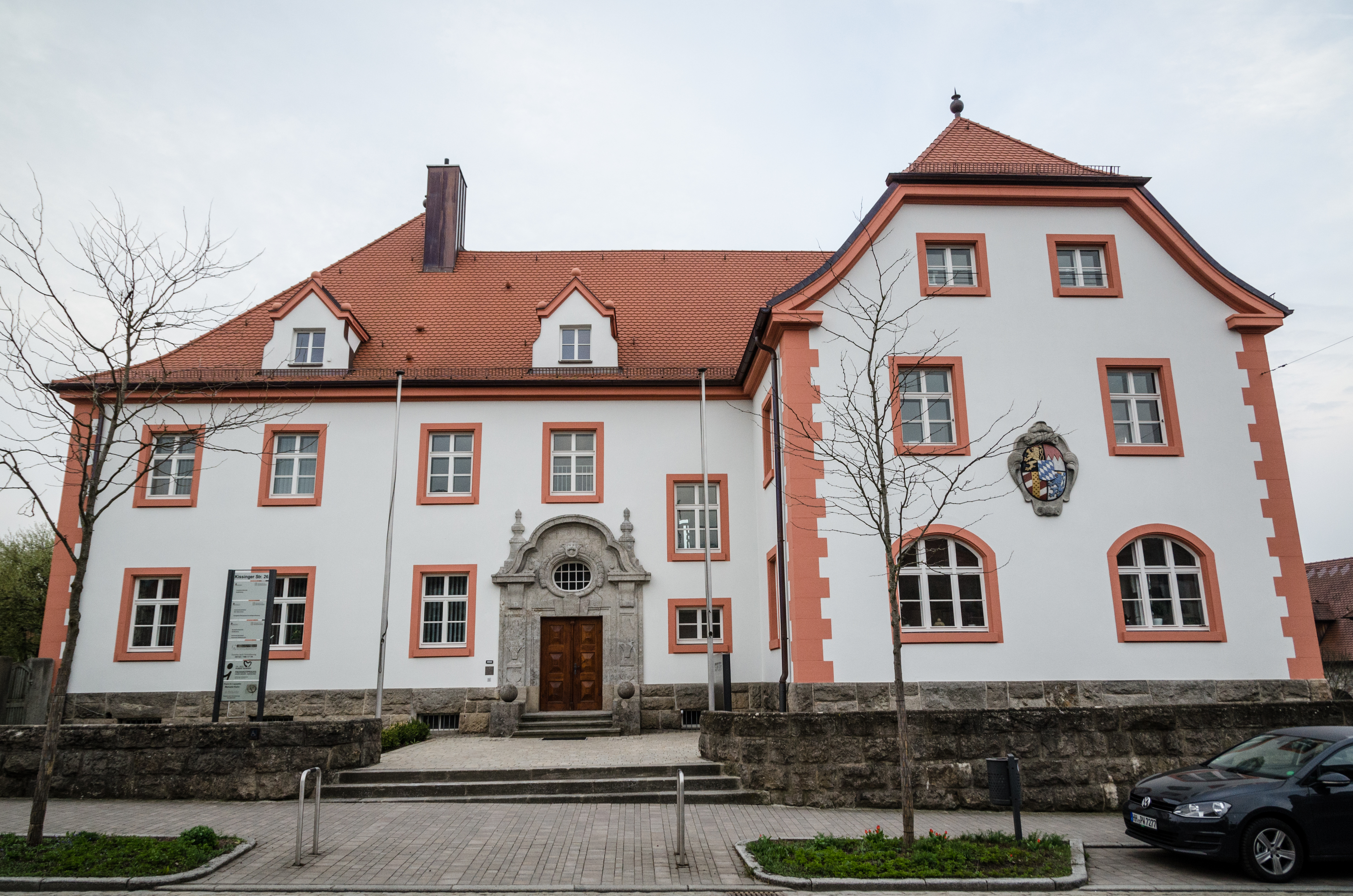 Hammelburg, Kissinger Straße 26